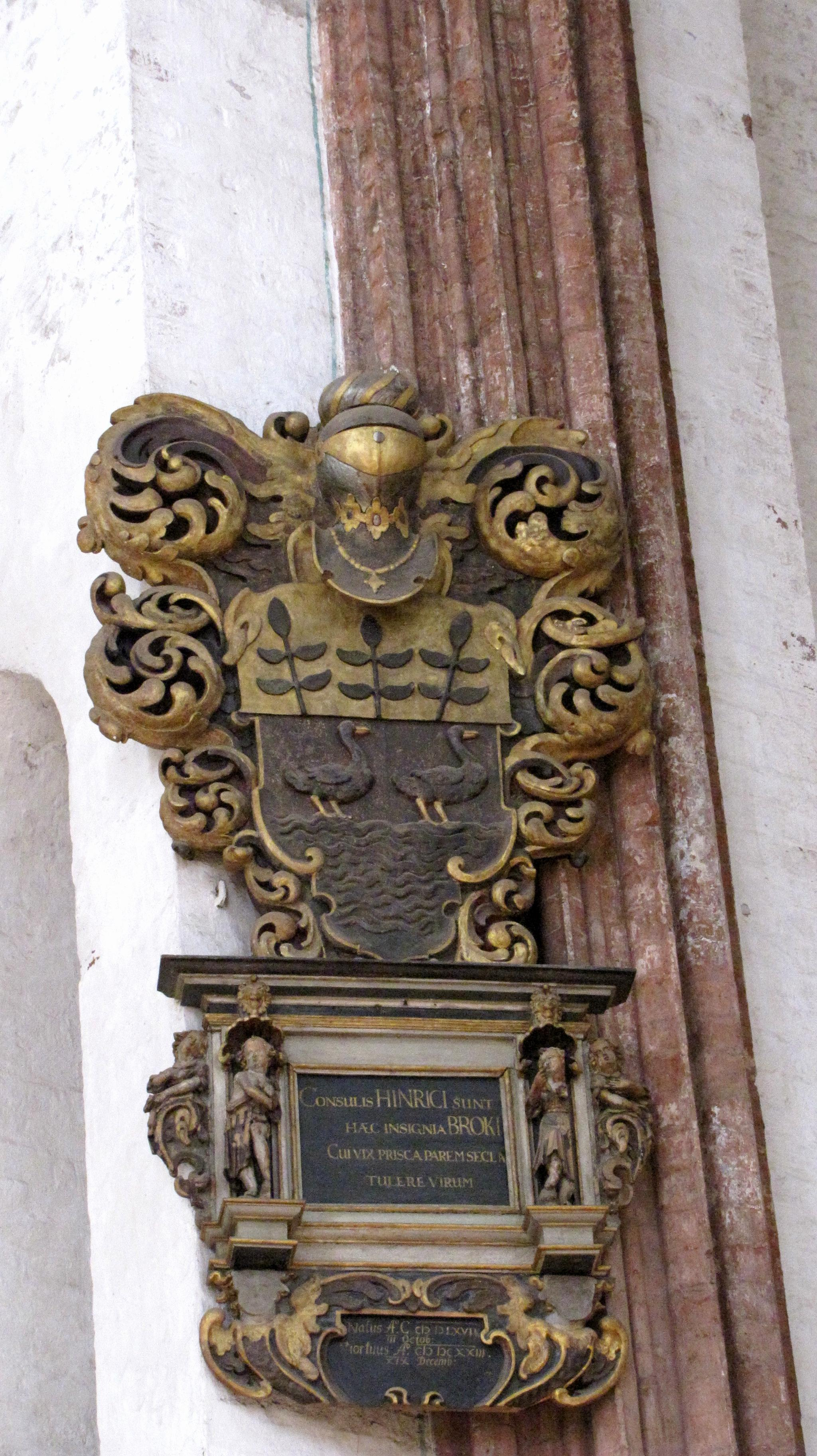 Epitaph for Heinrich Brockes I. (1567-1623) in St. Marien Lübeck